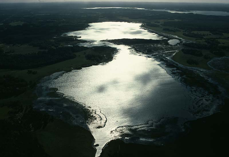 Teåkerssjön i Krokån. Motiv: Teåkerssjön Nyckelord: Flygbilder, Kvällsmotiv Kategori: Insjömiljöer Teåkerssjön i Krokån.